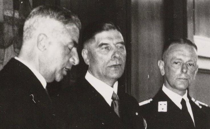 Installatie hoofdcommissaris Tulp; v.l.n.r. regeringscommissaris (burgemeester) Voûte, voormalig hoofdcommissaris Versteeg en SS-officier en nieuwe politiecommisaris Tulp.